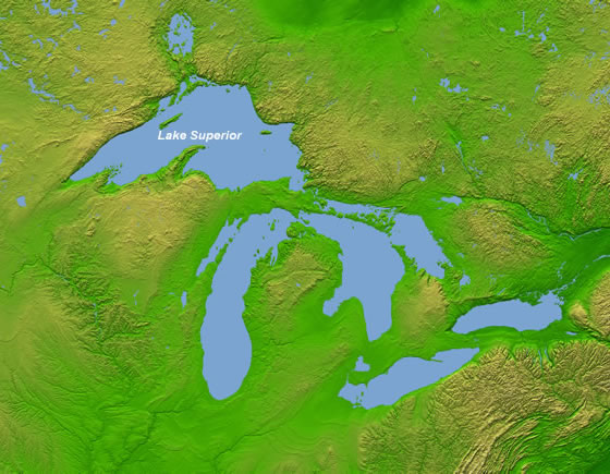 ภูมิประเทศของทะเลสาบสุพีเรีย